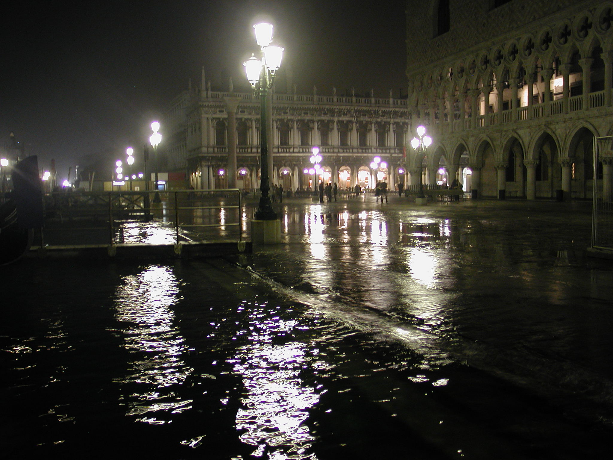 Venezia, piazza san Marco, acqua alta. Venice, Italy, hight water (small)